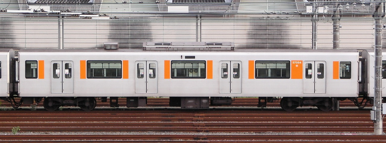 東武50050系の側面